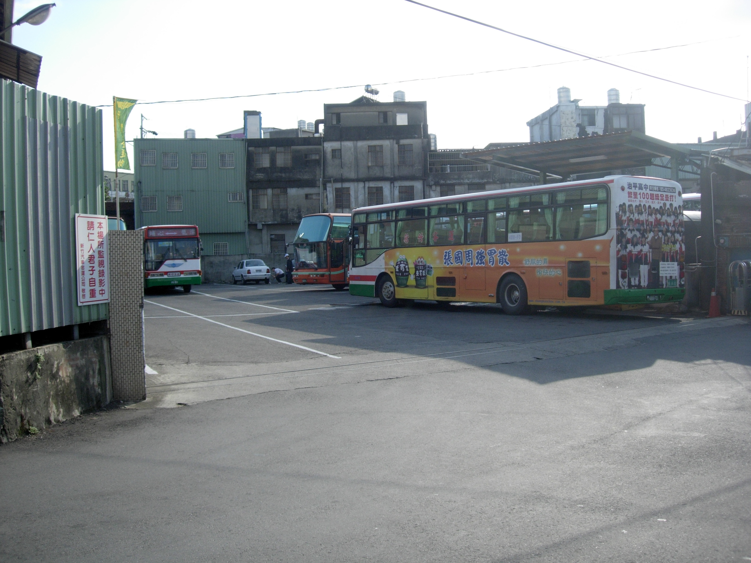 中文（台灣）: 新竹客運龍潭站車場